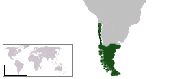 mapa de la capitania general de chile entre 1776 y 1810